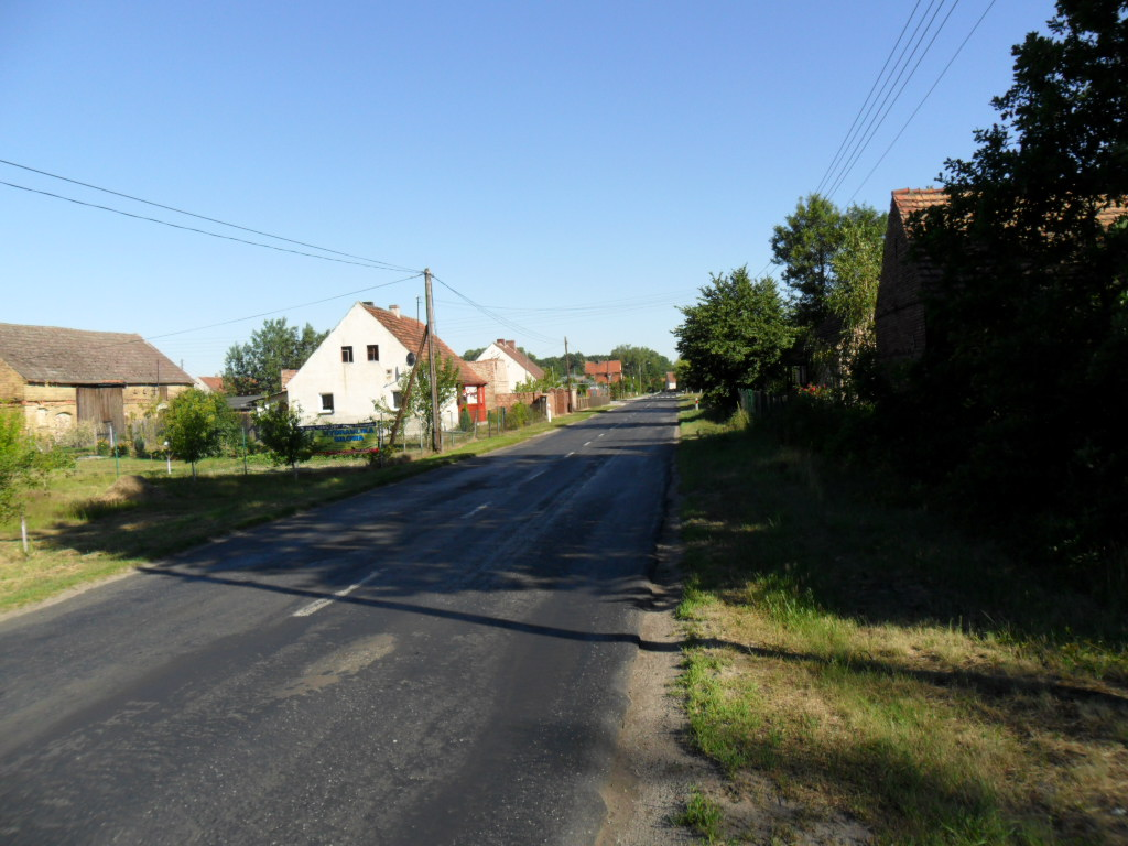 Biecz